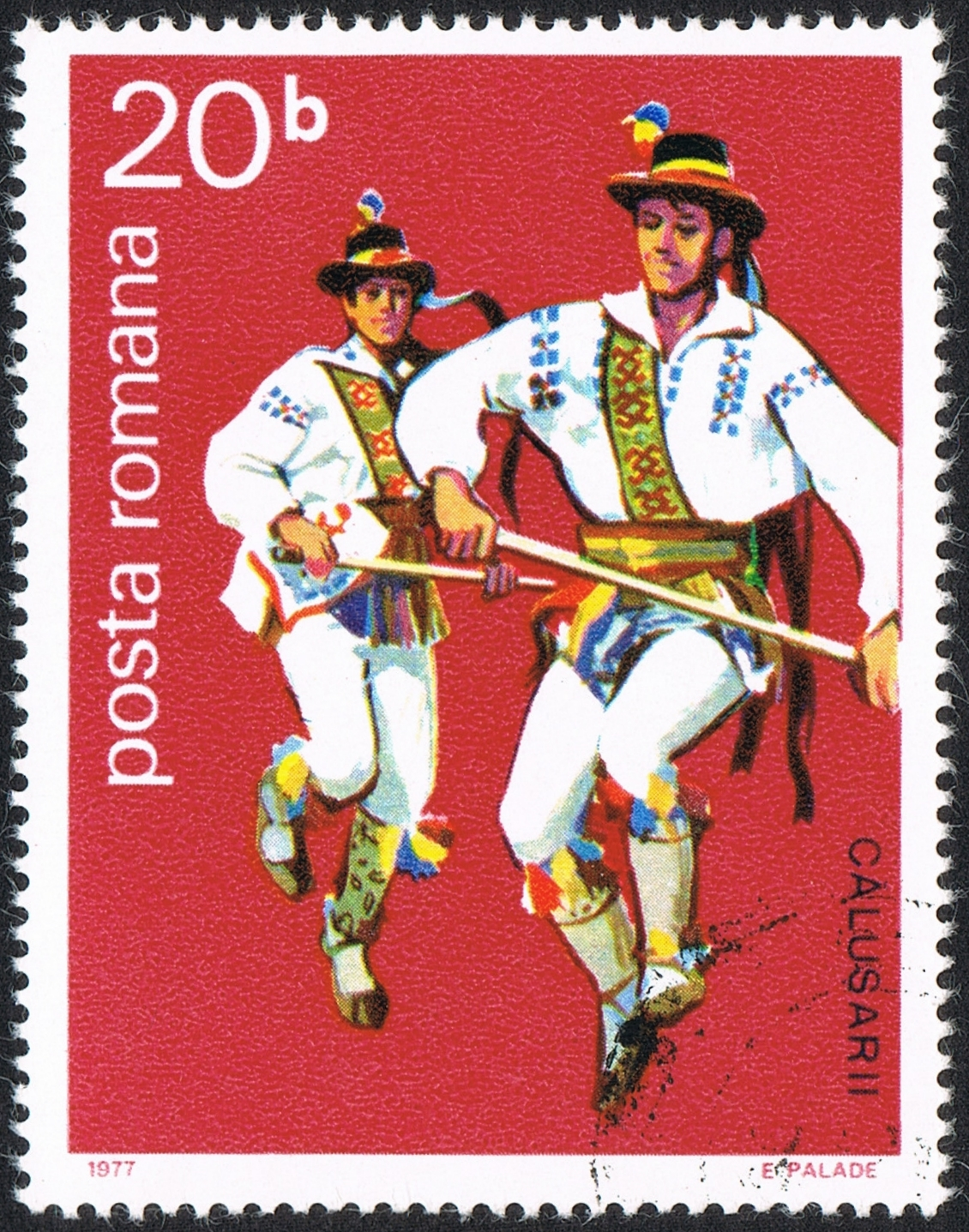 Romanina stamp of folk danser, Posta Romana, 1977 romanian stamp, danser, Calusarii, 1977, 20b, E. Palade. Michel stamp catalogue (East-Europe part 4) number: 3474